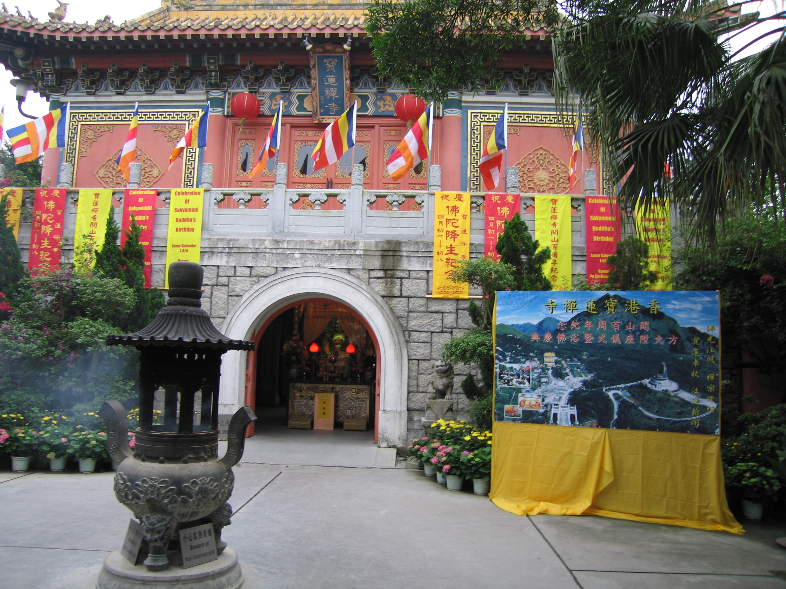 taken by Dennis Moynihan (2005)